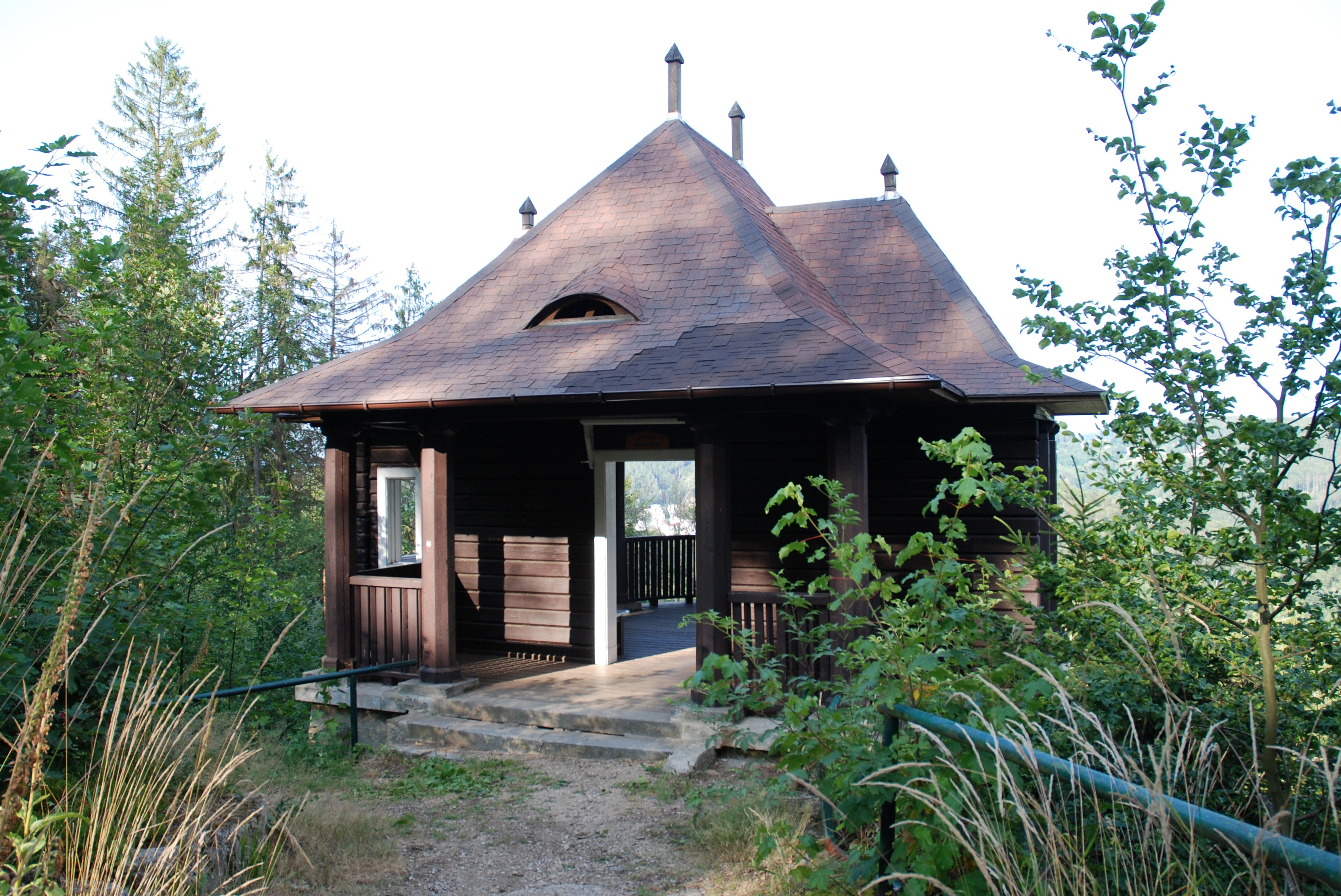 Chata Rusalka v lázeňských lesích Karlových Varů, turistický přístřešek